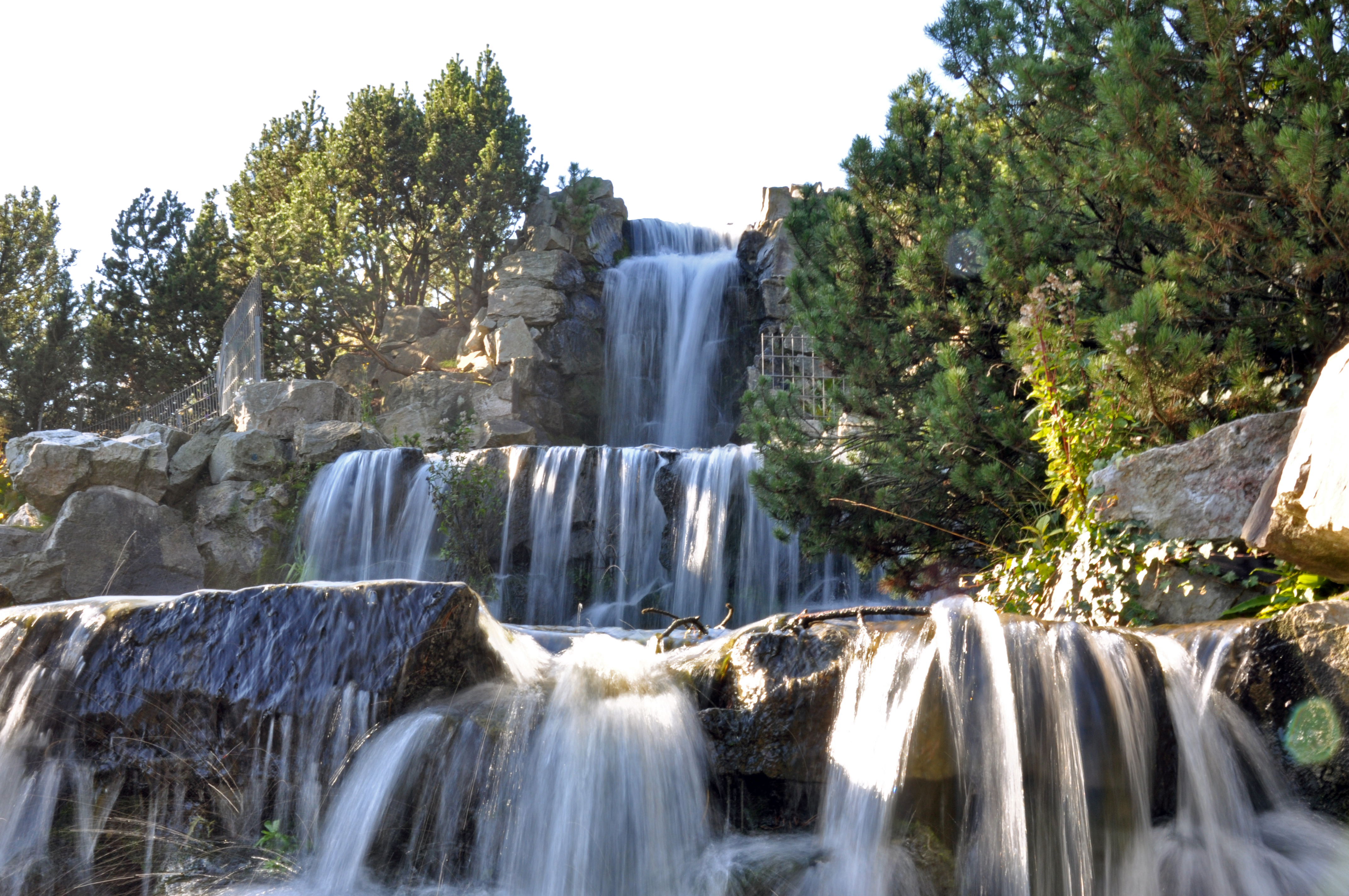 künstlicher Wasserfall in der Gruga Essen